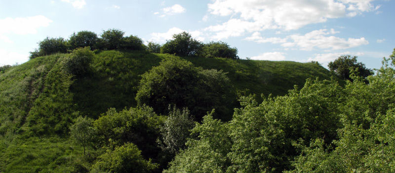 Wallburg in Nowe Proboszczewice